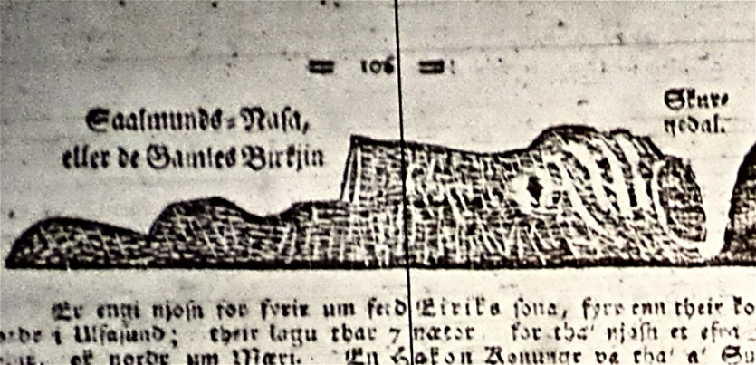 Teikning av Liadalsnipa i Ørsta, her namngitt som Saalmunds-Nasa